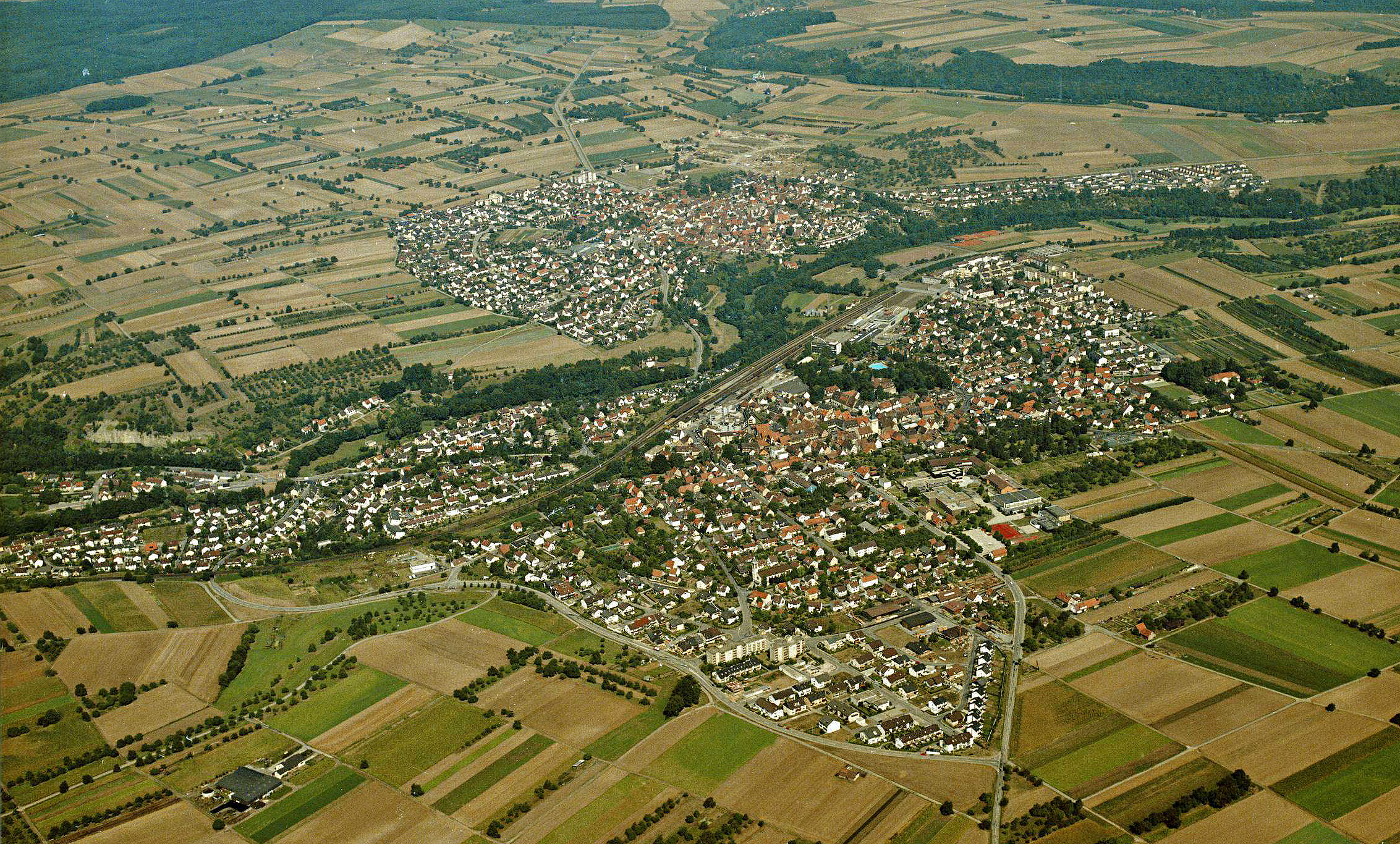 Groß- und Kleinsachsenheim von Süden (Ausschnitt)